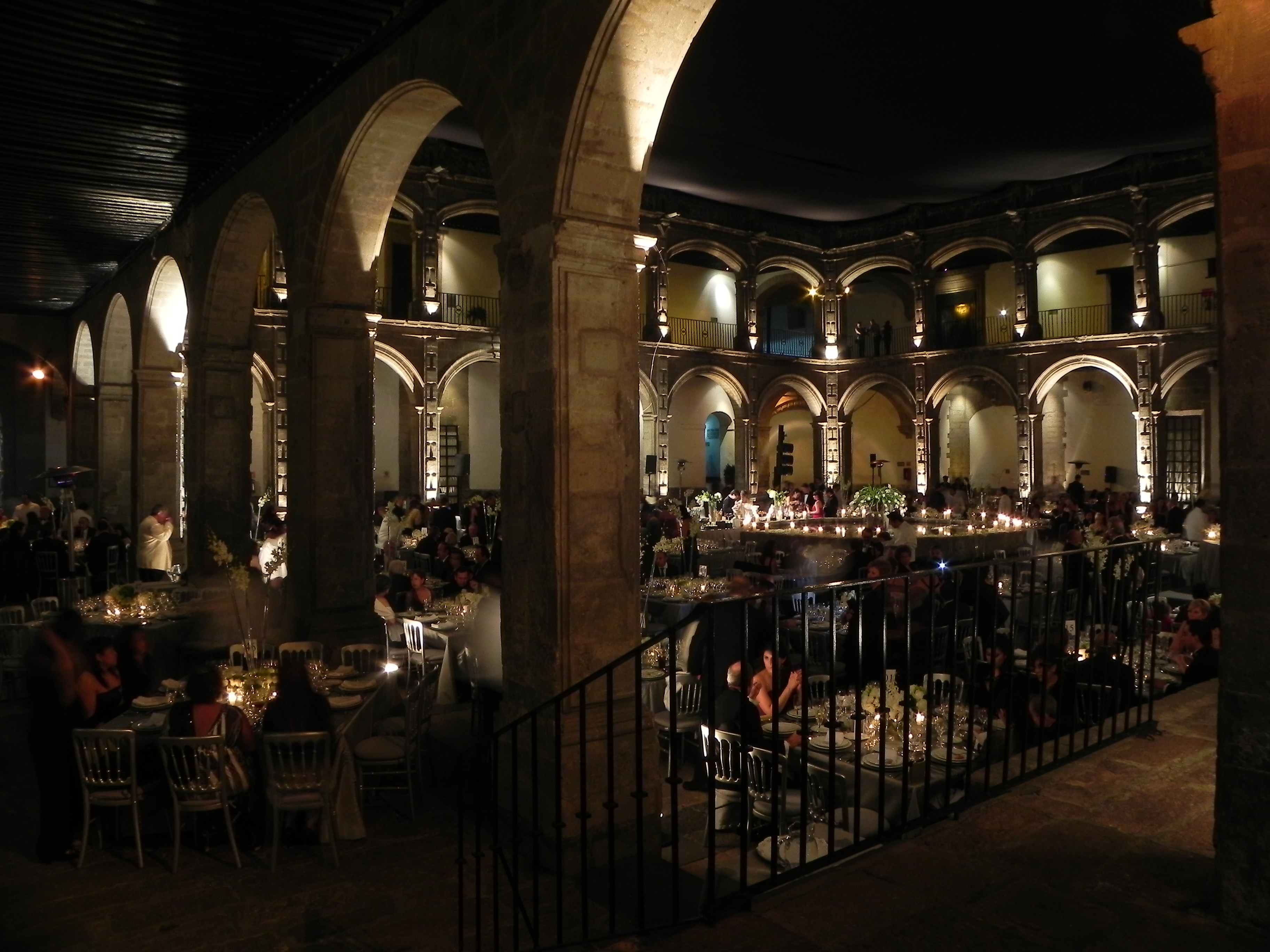 Ex Convento de San Hipólito